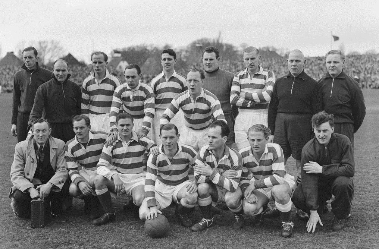 RCH tegen Blauw-Wit. Blauw-Wit elftal.